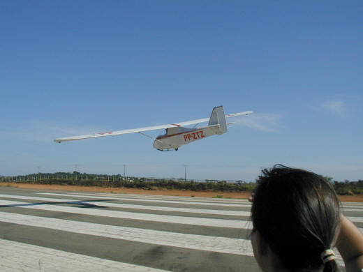 CB.1 Gaivota vindo para pouso em Divinópolis após sua restauração.